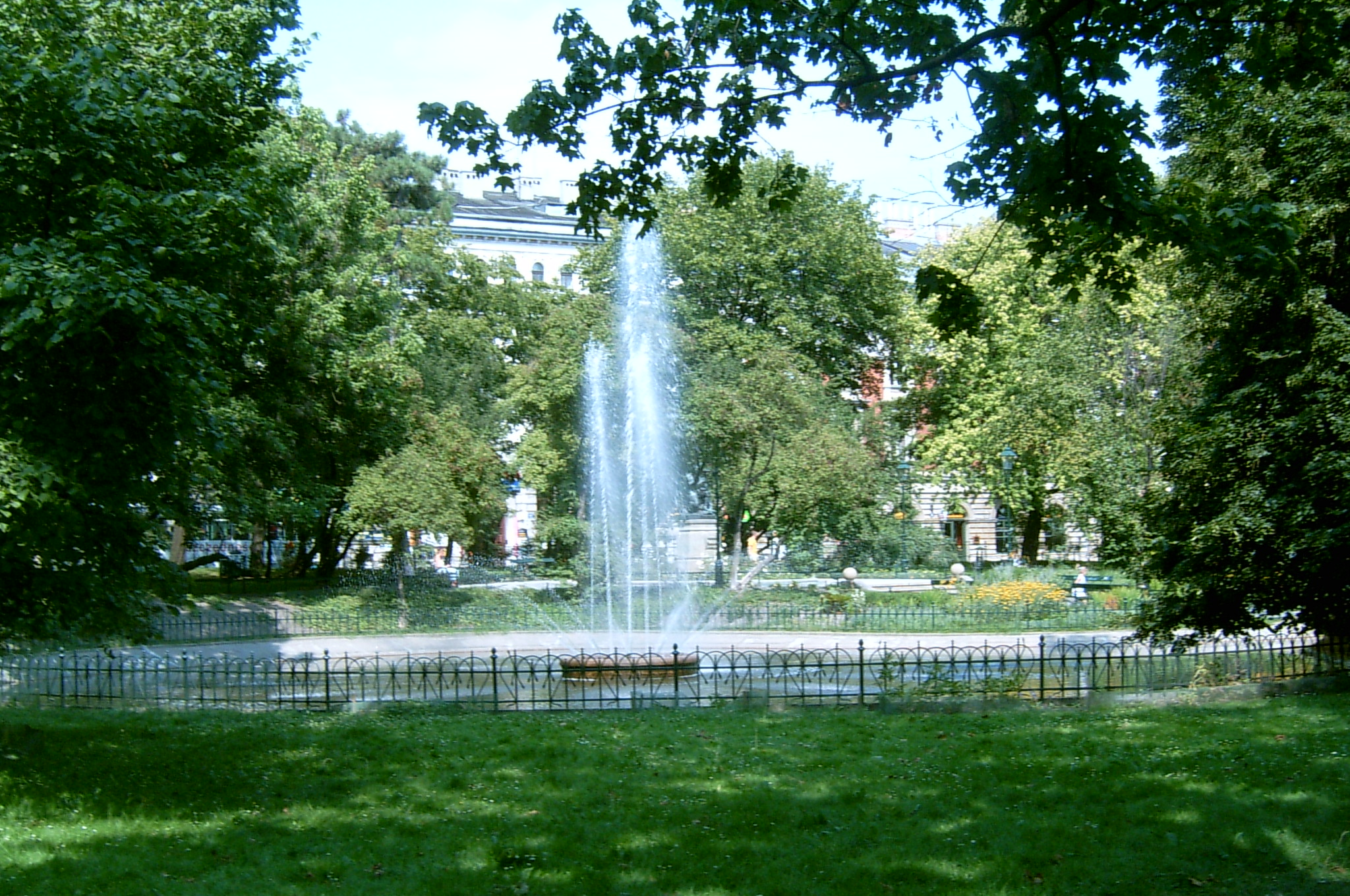 Kraków, Poland